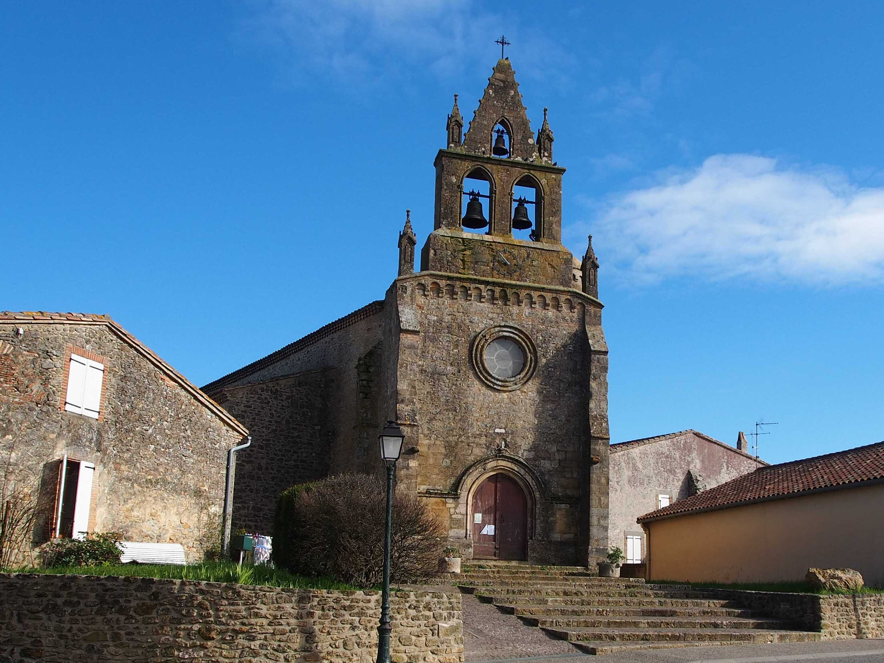 L'église de Mourvilles-Hautes